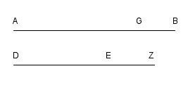 Il·lustració d'una de les proposiciones de les Data d'Euclides